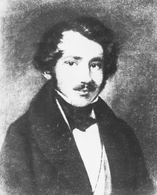 Friedrich Eduard Meyerheim (1808-1879), German painter